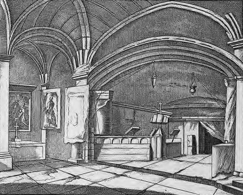 [Voyage au Levant. Pl. en reg. p.315 : Voyage de Saint-Jean-d'Acre à Nazareth. Vue de Nazareth. Grotte de l'Annonciation.] Nazareth (...). [Cote : Réserve A 200 293]